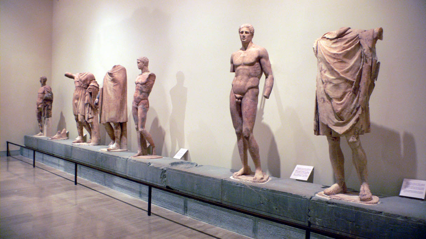 Exvoto de Daoco. Museo arqueológico de Delfos.